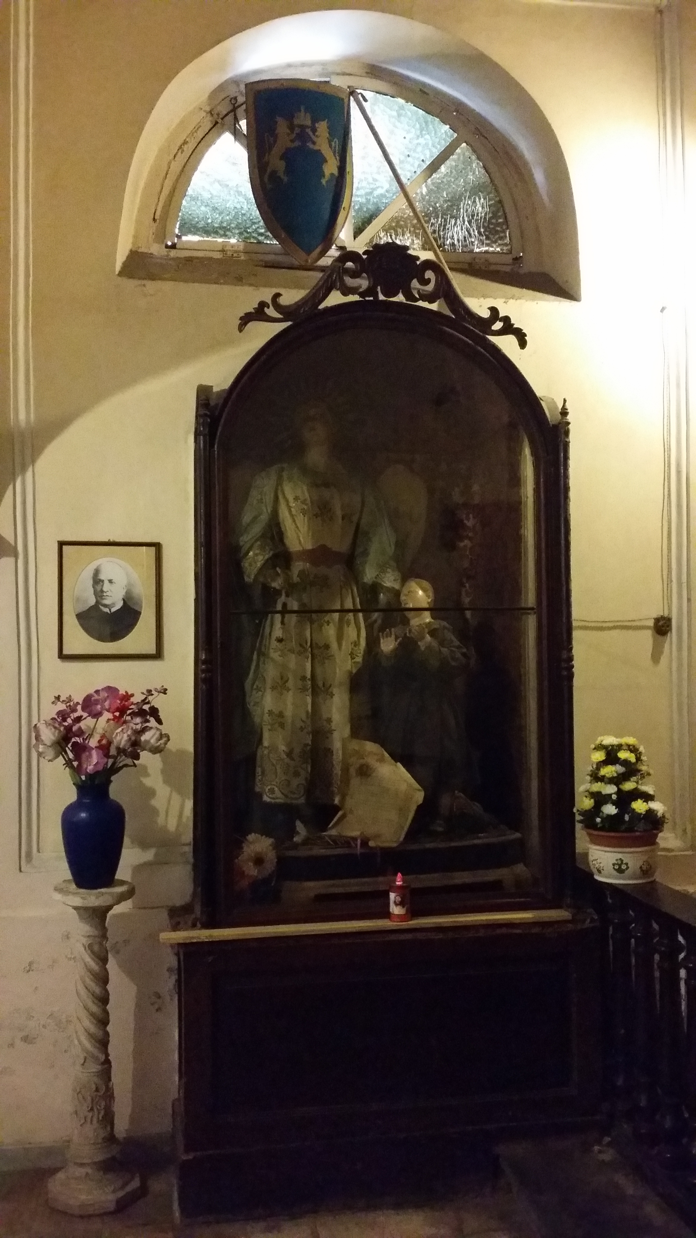 Teca di vetro contenente la statua dell’angelo custode e del Bambino Gesù situata nella cappella di San Giuda Taddeo apostolo-Angri (Sa).